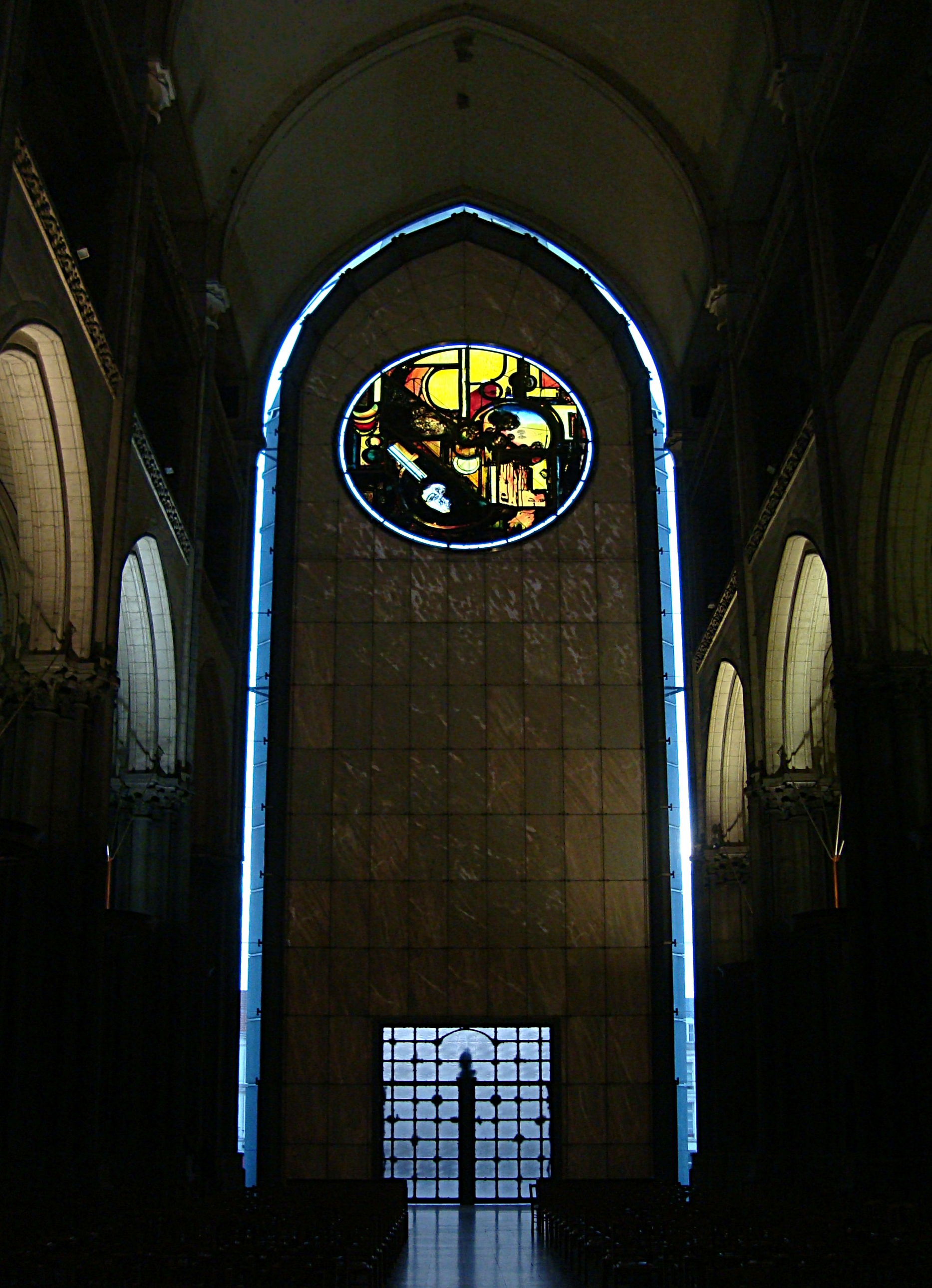 Le porche de la cathédrale Notre-Dame de la Treille de Lille (Nord), vu de l'intérieur. La façade en forme d'ogive contient un vitrail circulaire dessiné par Ladislas Kijno.